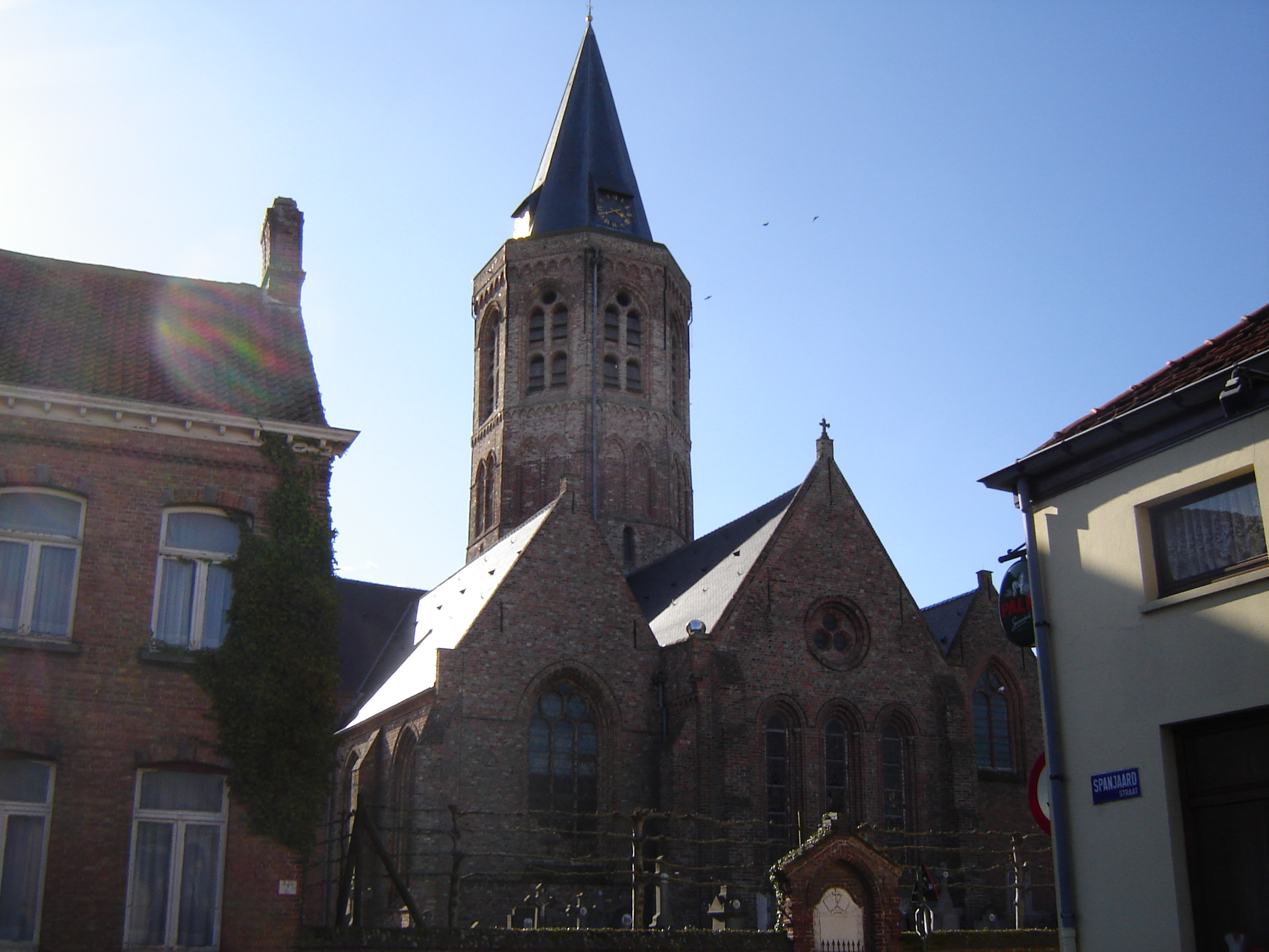 Sint-Jan-de-Doperkerk in Stalhille Church of Saint John the Baptist in Stalhille, Jabbeke, West Flanders, Belgium